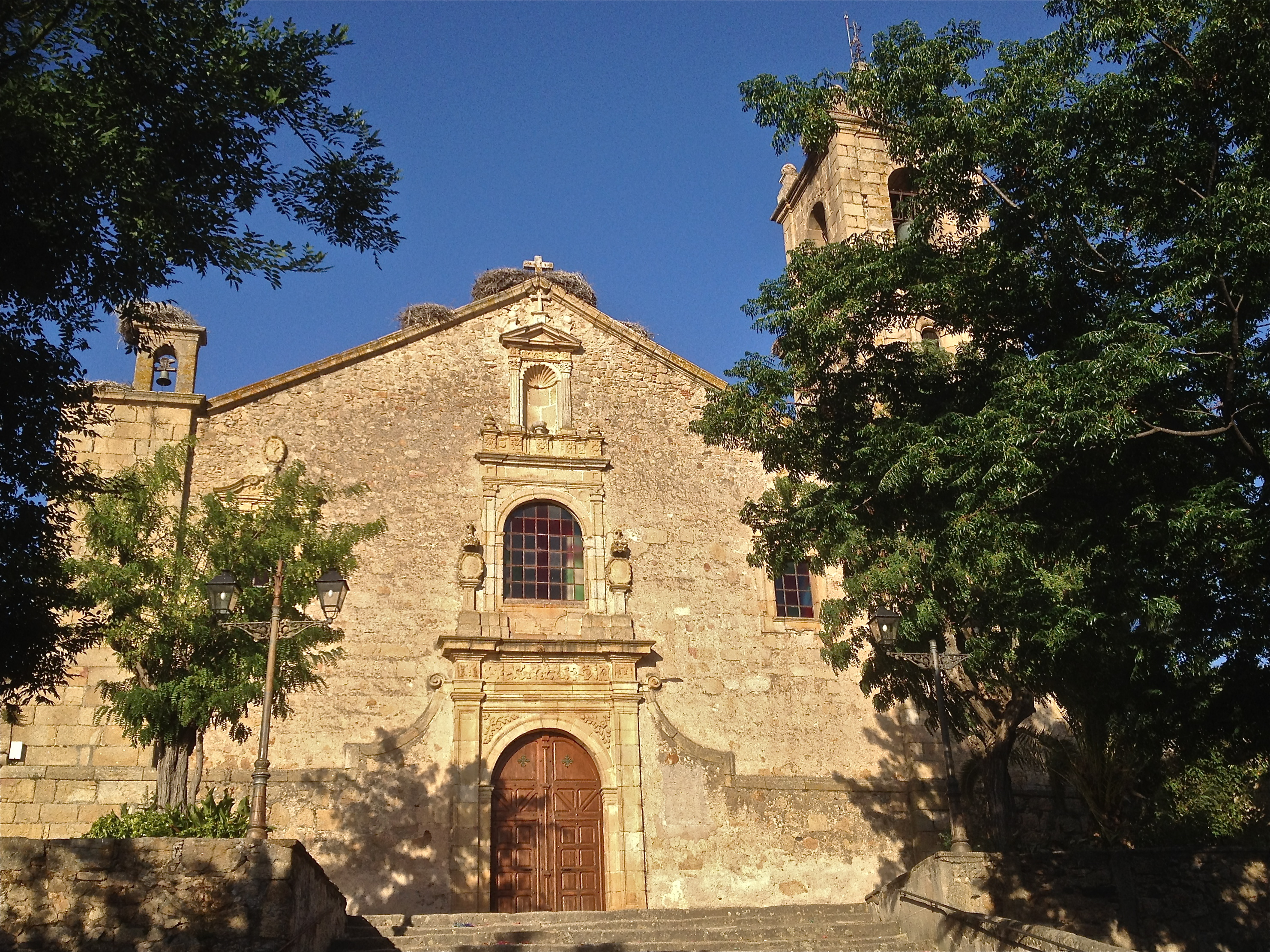 Iglesia de Rocamador, Valencia de Alcántara, provincia de Cáceres, España